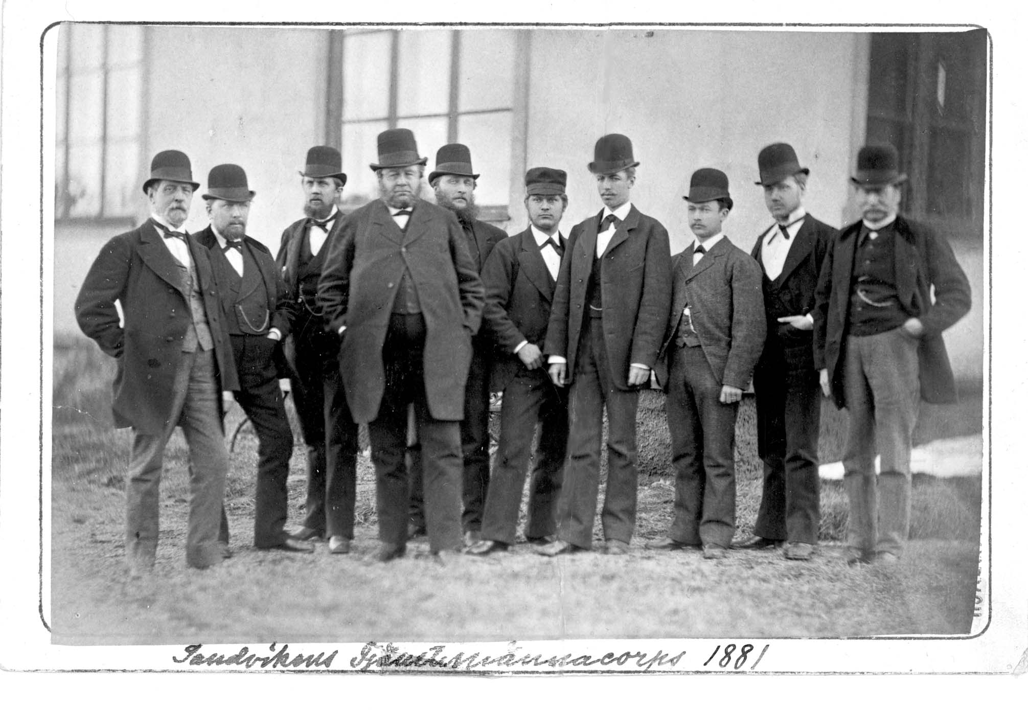 Sandvikens tjänstemannacorps 1881 Fr. vänster: Hr Weuer? korrespondent, kassör Björkman, ing Albert Göransson hyttingenjör, Konsuln, verkmästare CG Larson hammar och valsverk, ing Forsberg ritare, hr Emil Forsström bokhållare, ing Tord Magnuson tråddrageriet, hr And. Olson bokhållare, hr Essén (majorn) kemist och medieförvaltare (fd apotekare)